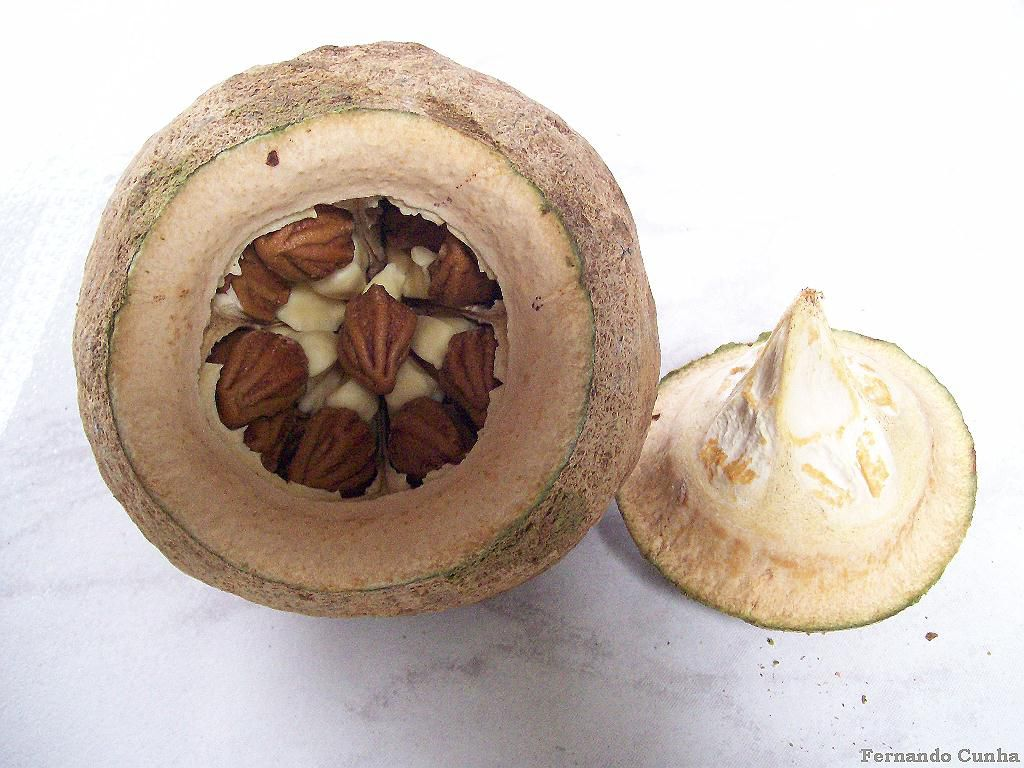 Amendoa da sapucaia.